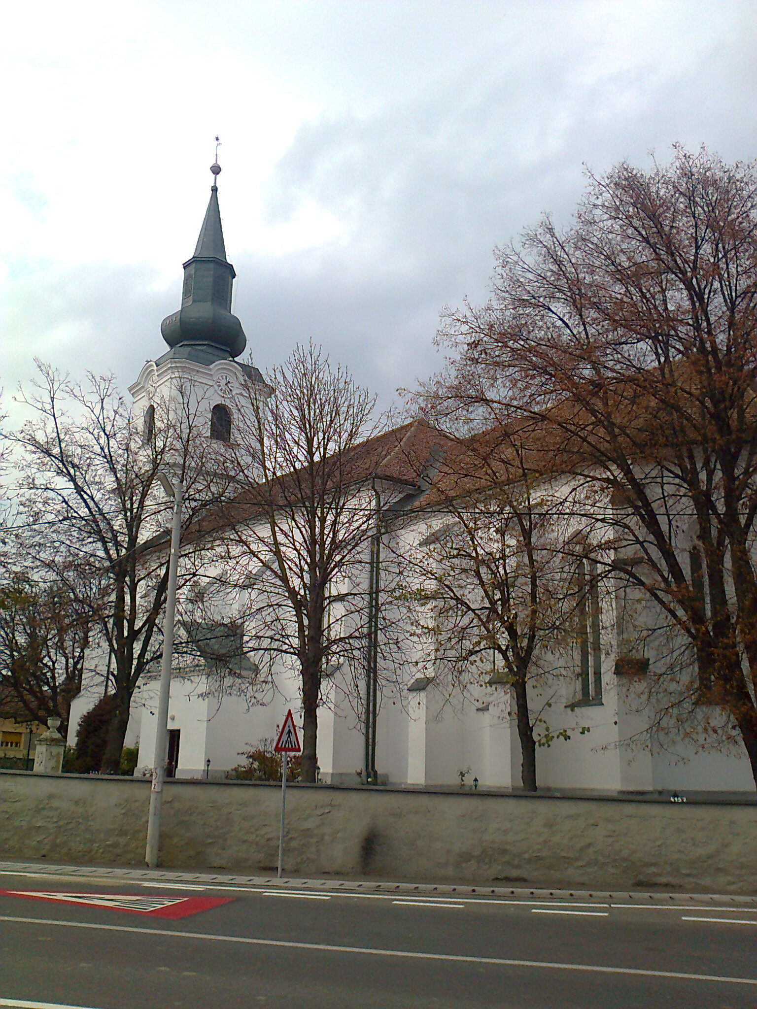 Szilágynagyfalu református temploma